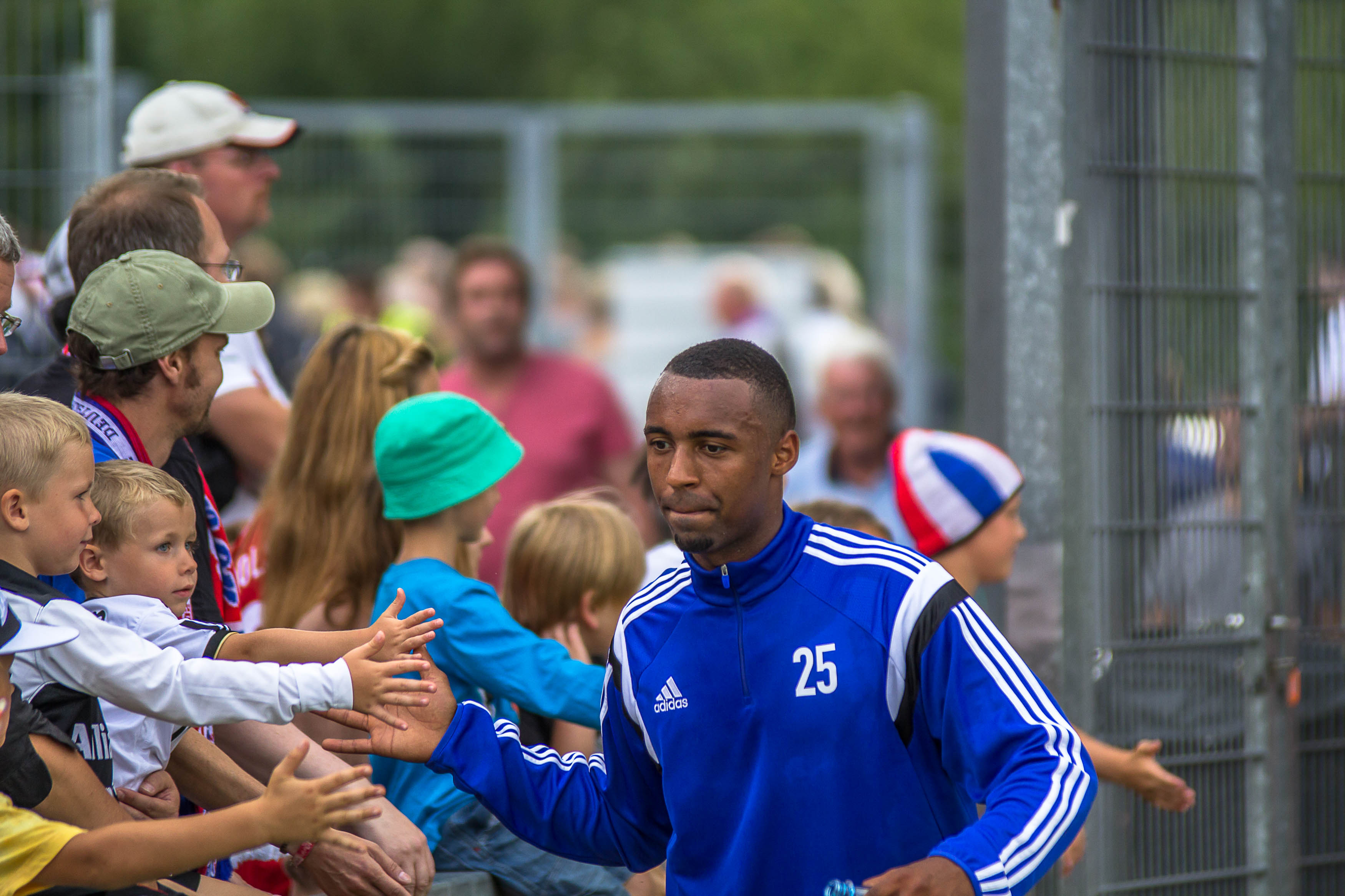 Saliou Sané (Holstein Kiel)